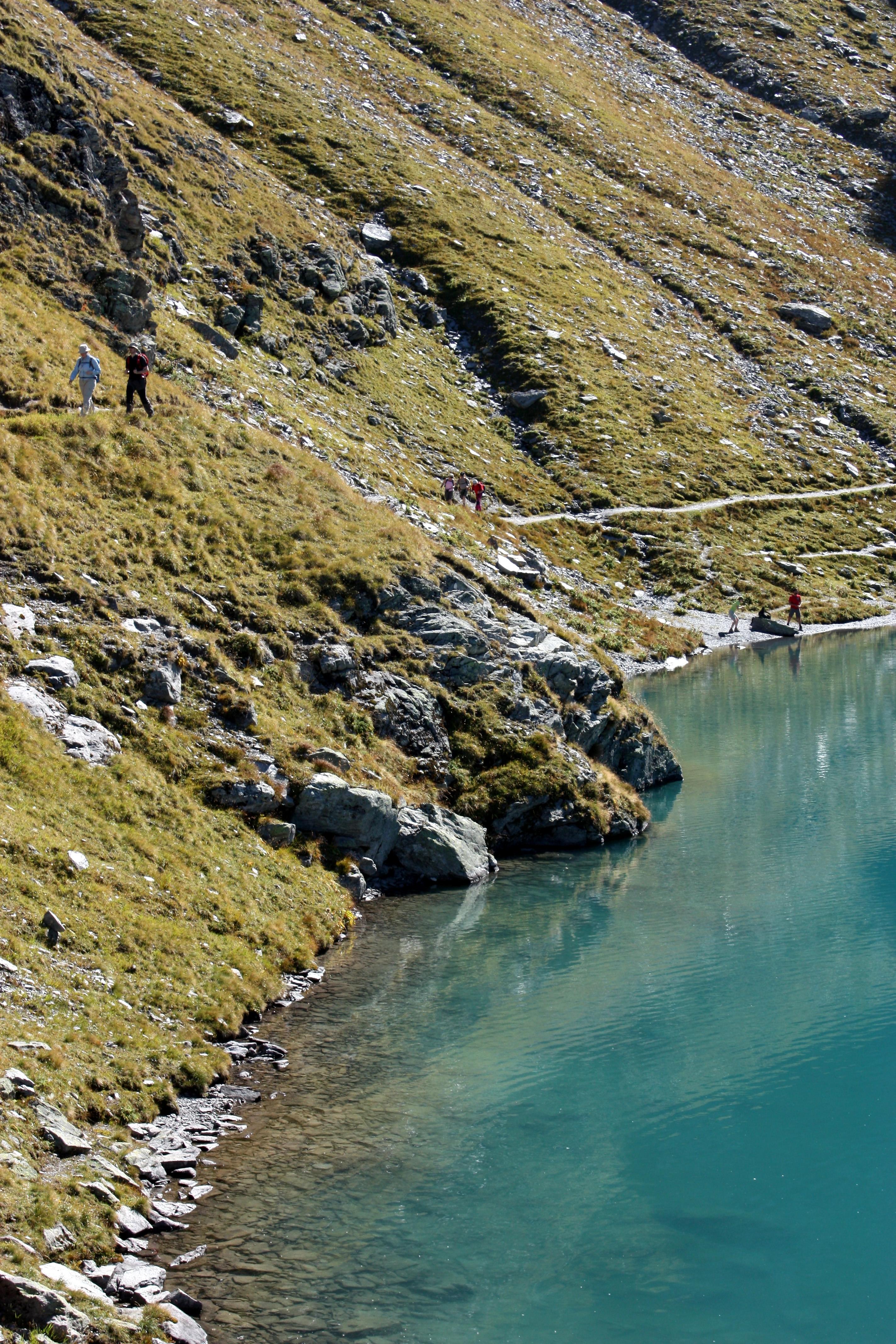 Schottensee